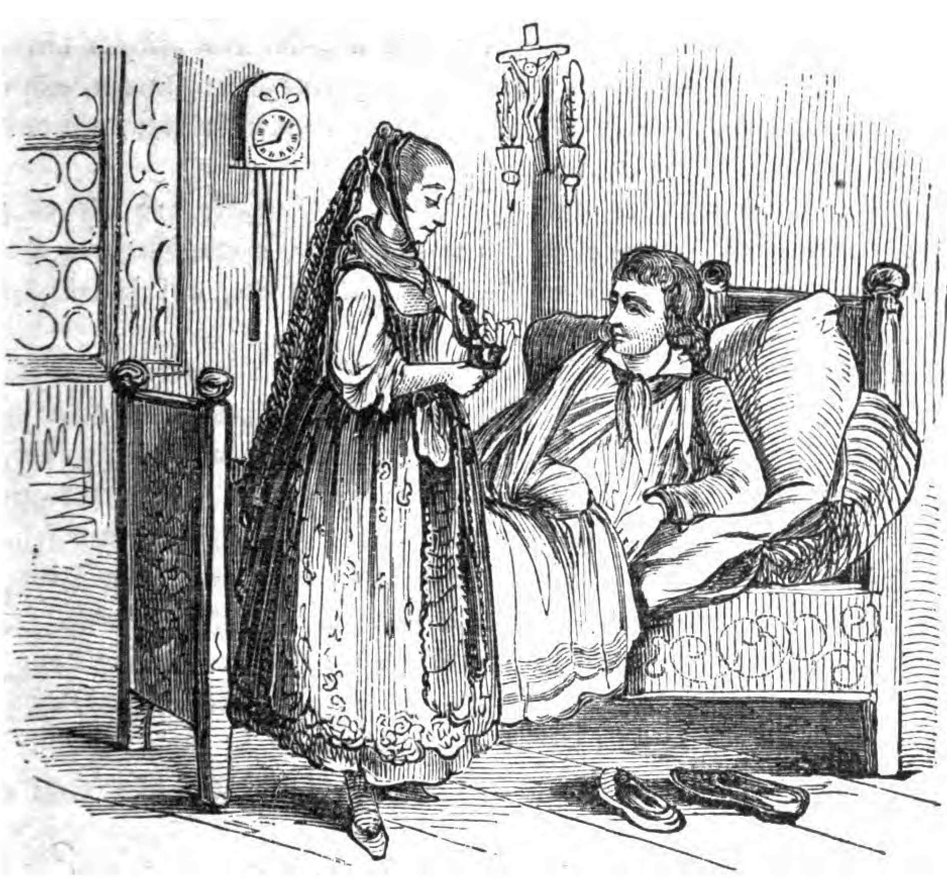 Berthold Auerbach, Schwarzwälder Dorfgeschichten, Die Kriegspfeife. – „Als er erwachte, war das erste, was er verlangte: seine Pfeife.“